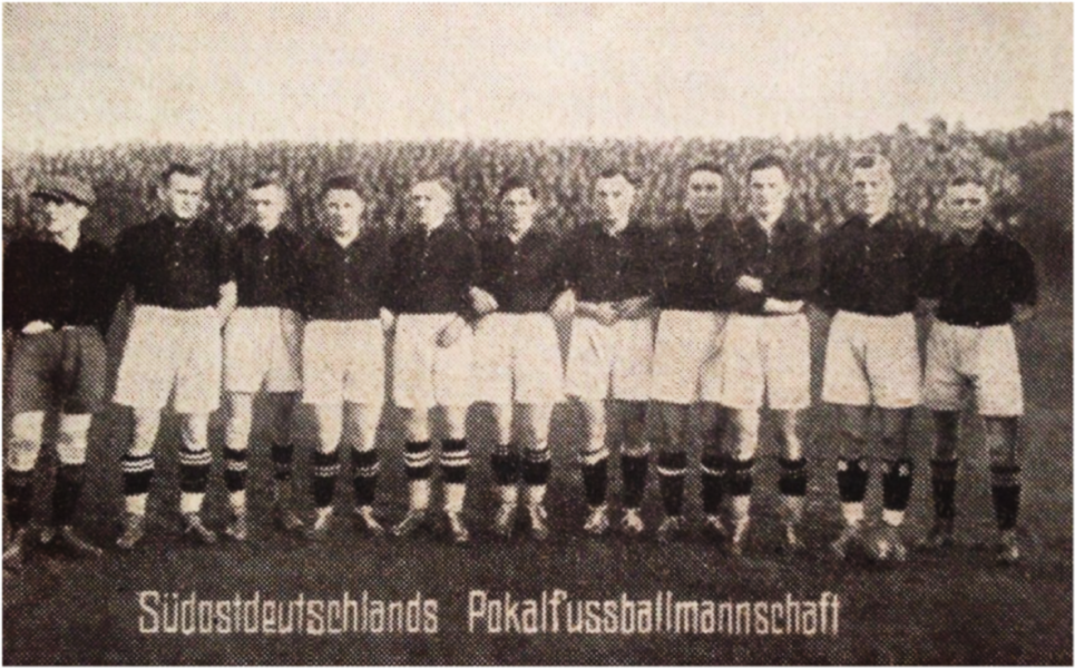 Südostdeutschlands Pokalfußballmannschaft brachte es in der Saison 1926/27 fertig, in der Vorrunde um den DFB-Pokal (Bundespokal) Süddeutschland mit 2:0 zu schlagen. Erst in der Zwischenrunde unterlag die Elf dem Verband Brandenburgischer Ballspiel-Vereine.